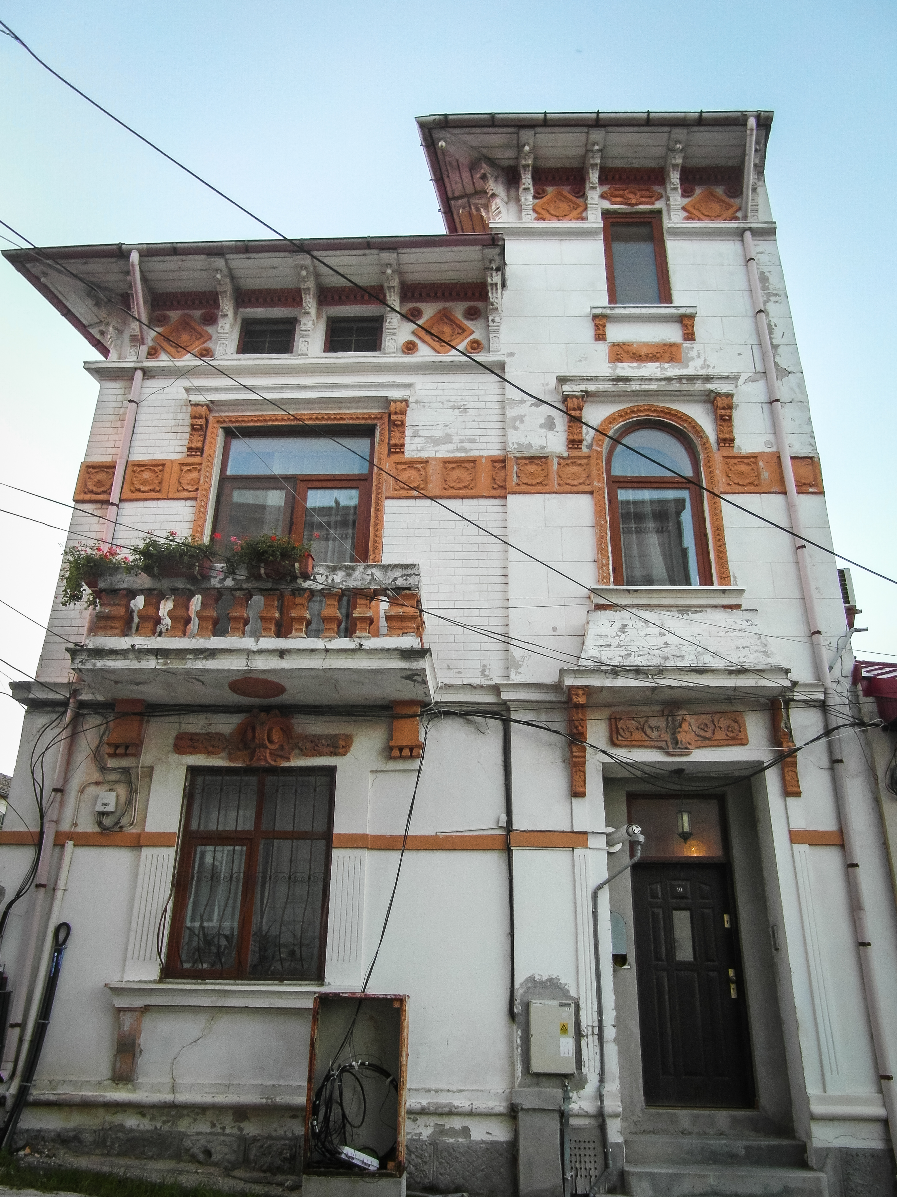 Casa - Str. Sulmona 10 - 1890, Constanta